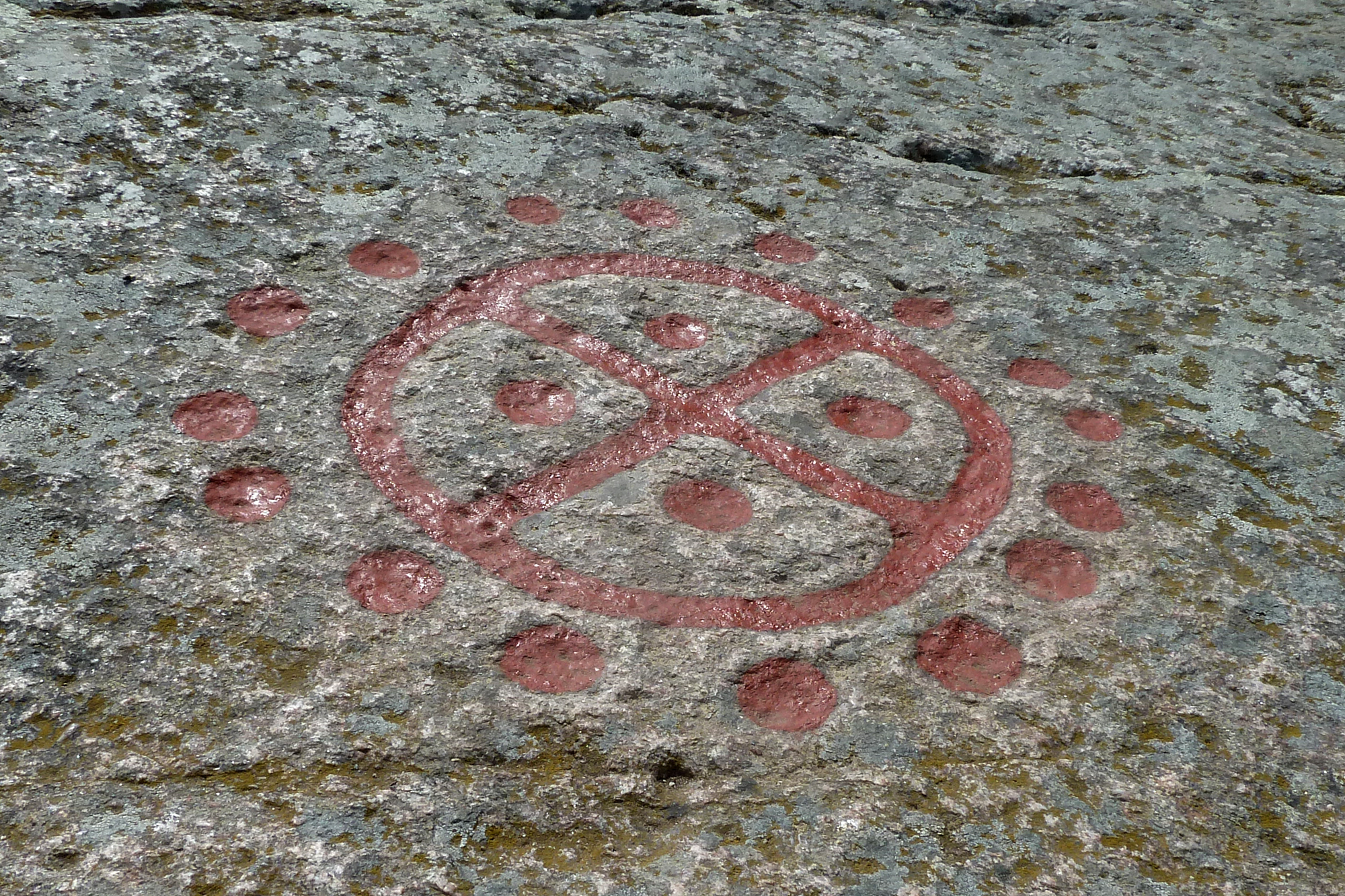 Felsritzungen Madsebakke auf Bornholm: Großes Radkreuz mit Schalengruben